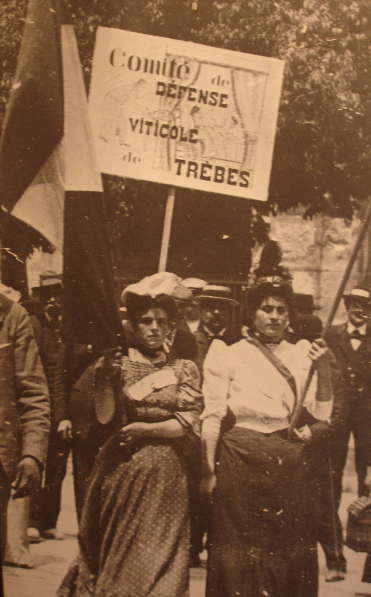 Femme en colère à Trèbes: manifestations de vignerons dans l'Aude lors de la crise viticole de 1907. Photo prise à l'exposition de l'abbaye de Caunes-Minervois